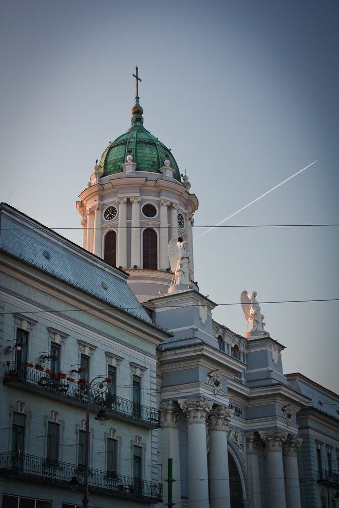 arad - catedrala catolica (3)